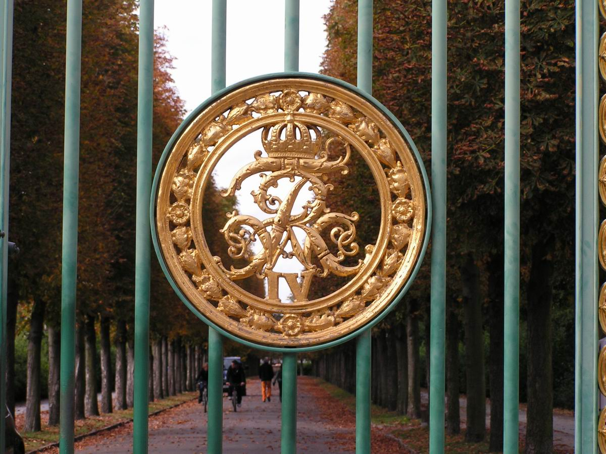 Potsdam, Grünes Gitter, Detail Fotografiert von Dieter Brügmann am 18.10.2005.